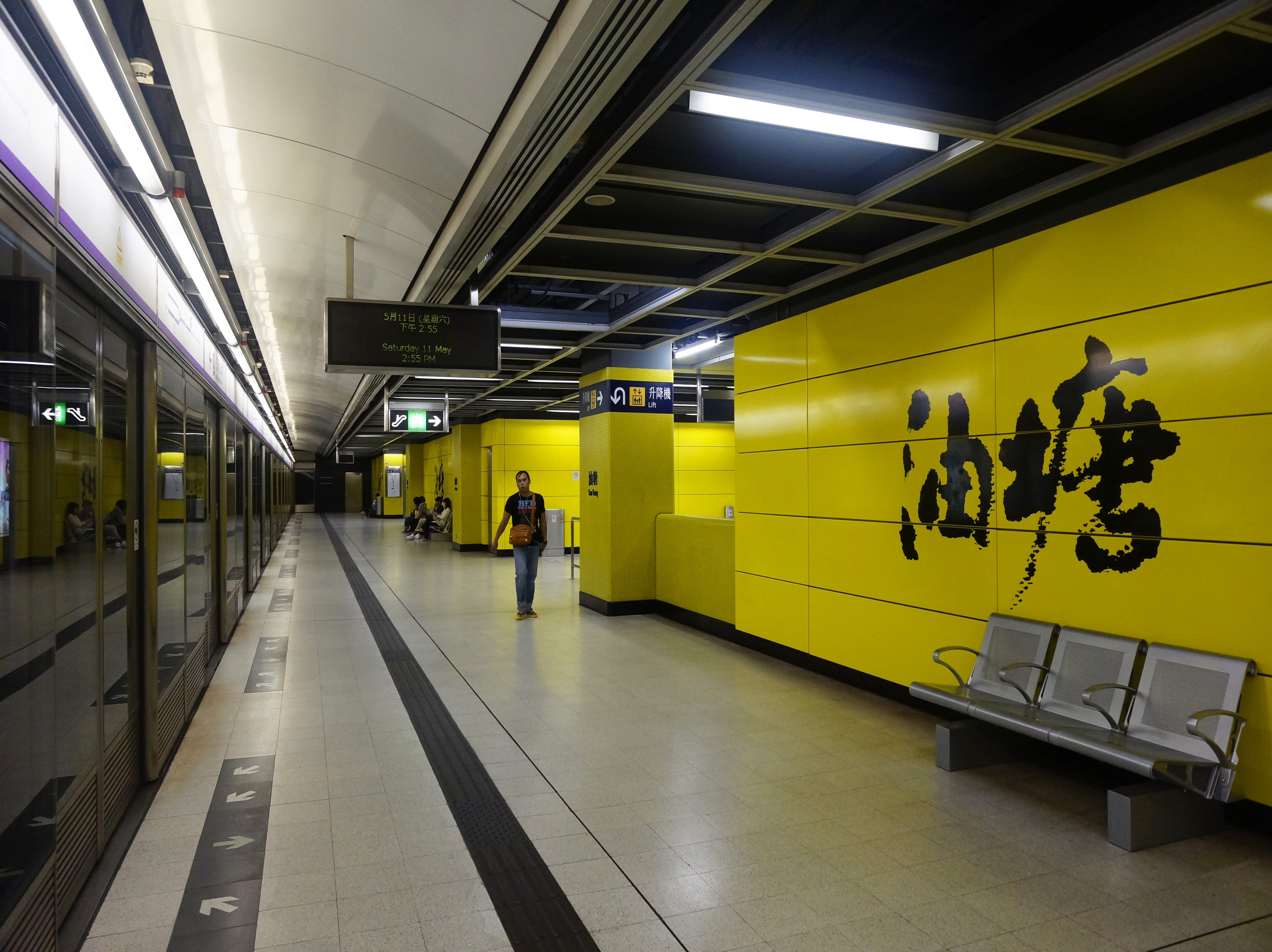 港鐵油塘站將軍澳線月台